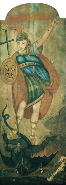 Арханёл Міхал. Другая палова XVIІI ст. З в. Ляхавічы Драгічынскага р-на. МСБК ІМЭФ НАН